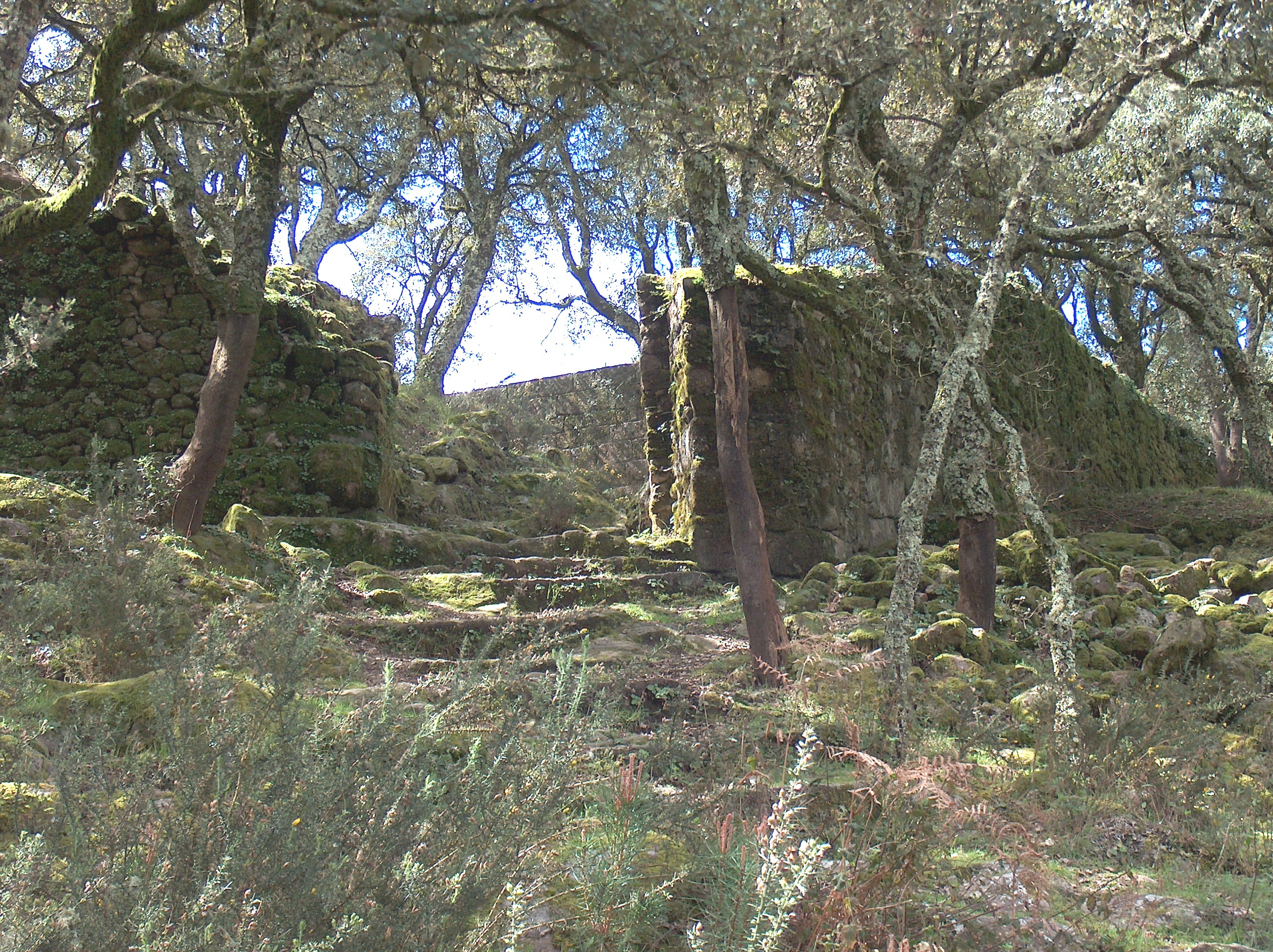 Castelo de Faria. no concelho de Barcelos, distrito de Braga, Portugal.